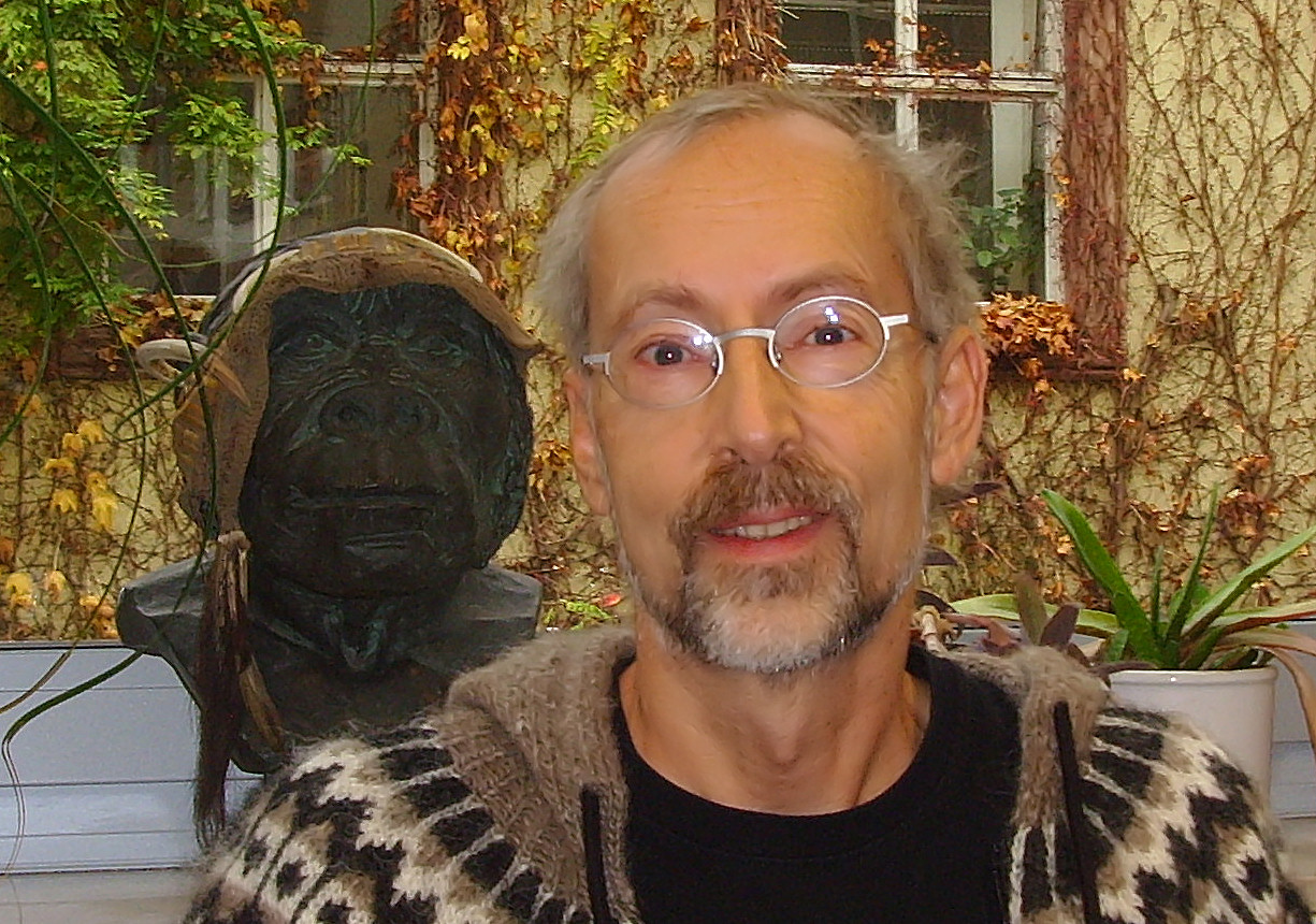 Karl-Heinz Wellmann, Buchautor und Hörfunkredakteur